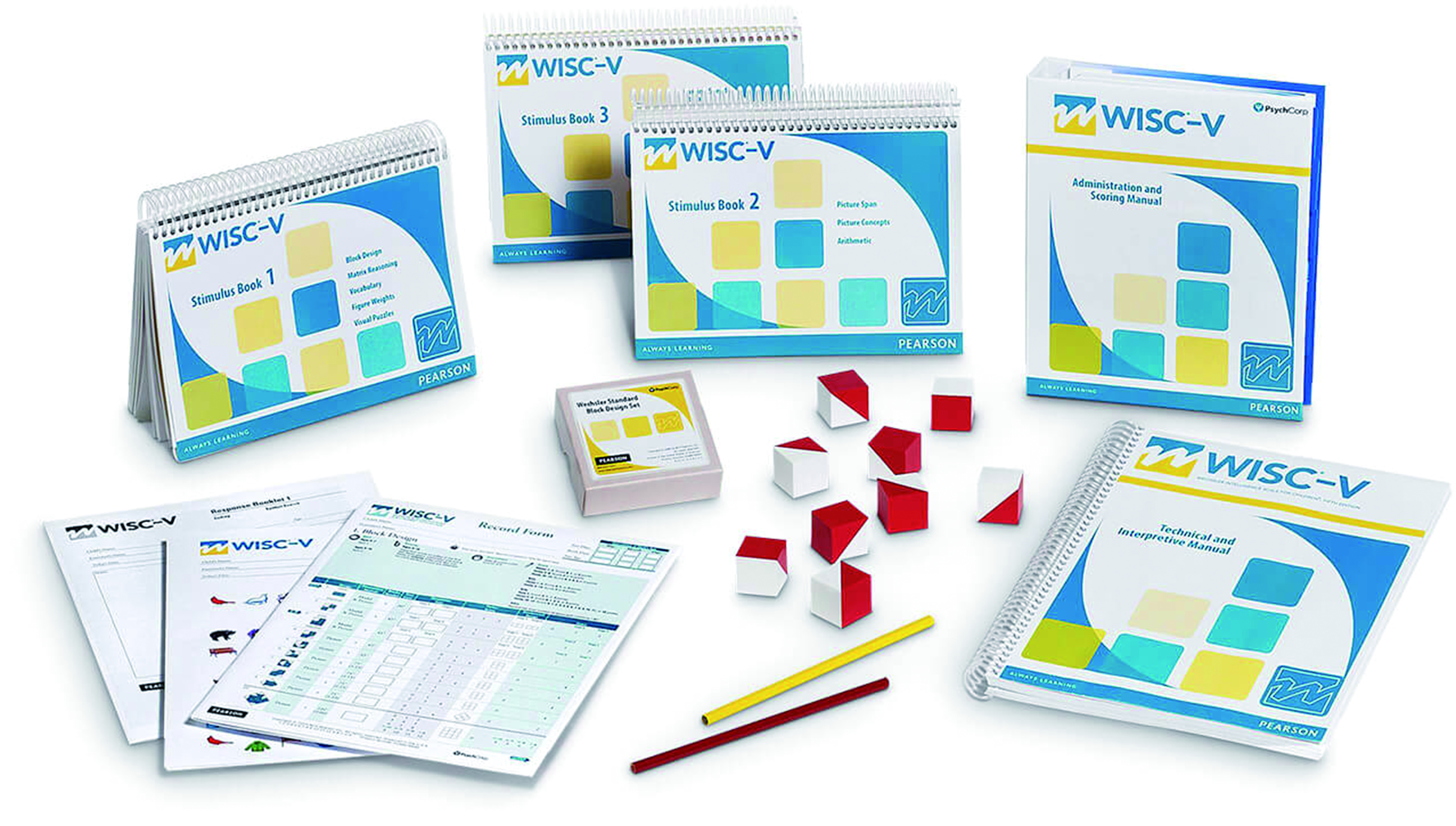 Bestandteile des WISC-V Gesamtsatzes